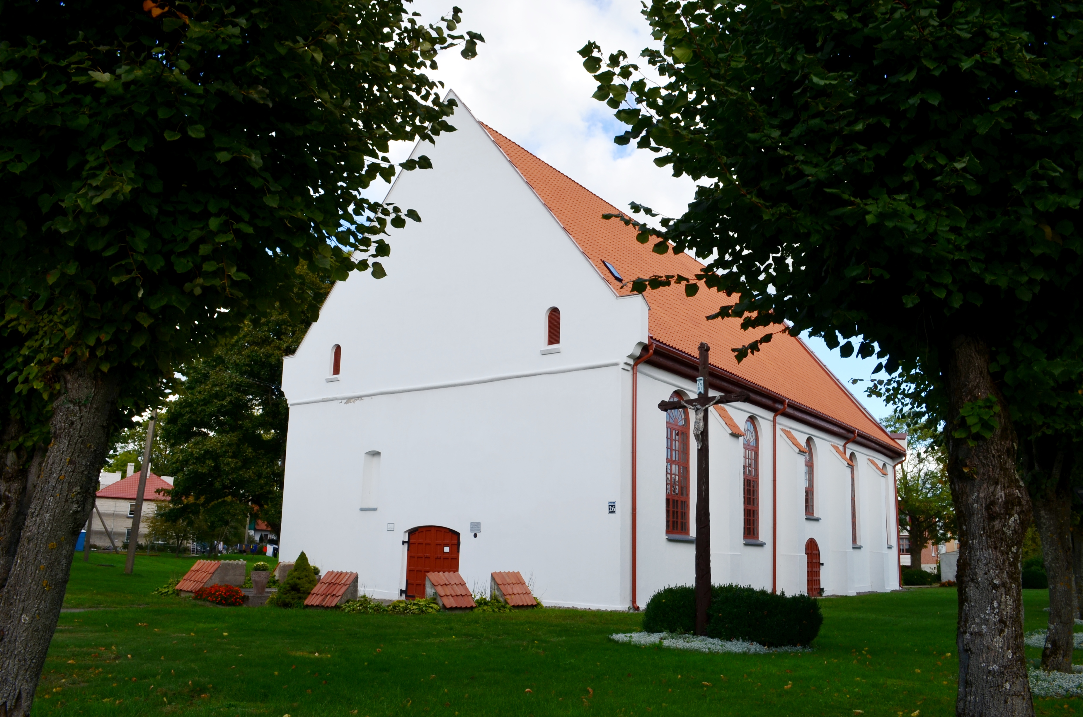 Kintų buv. liuteronų bažnyčia, Šilutės raj.